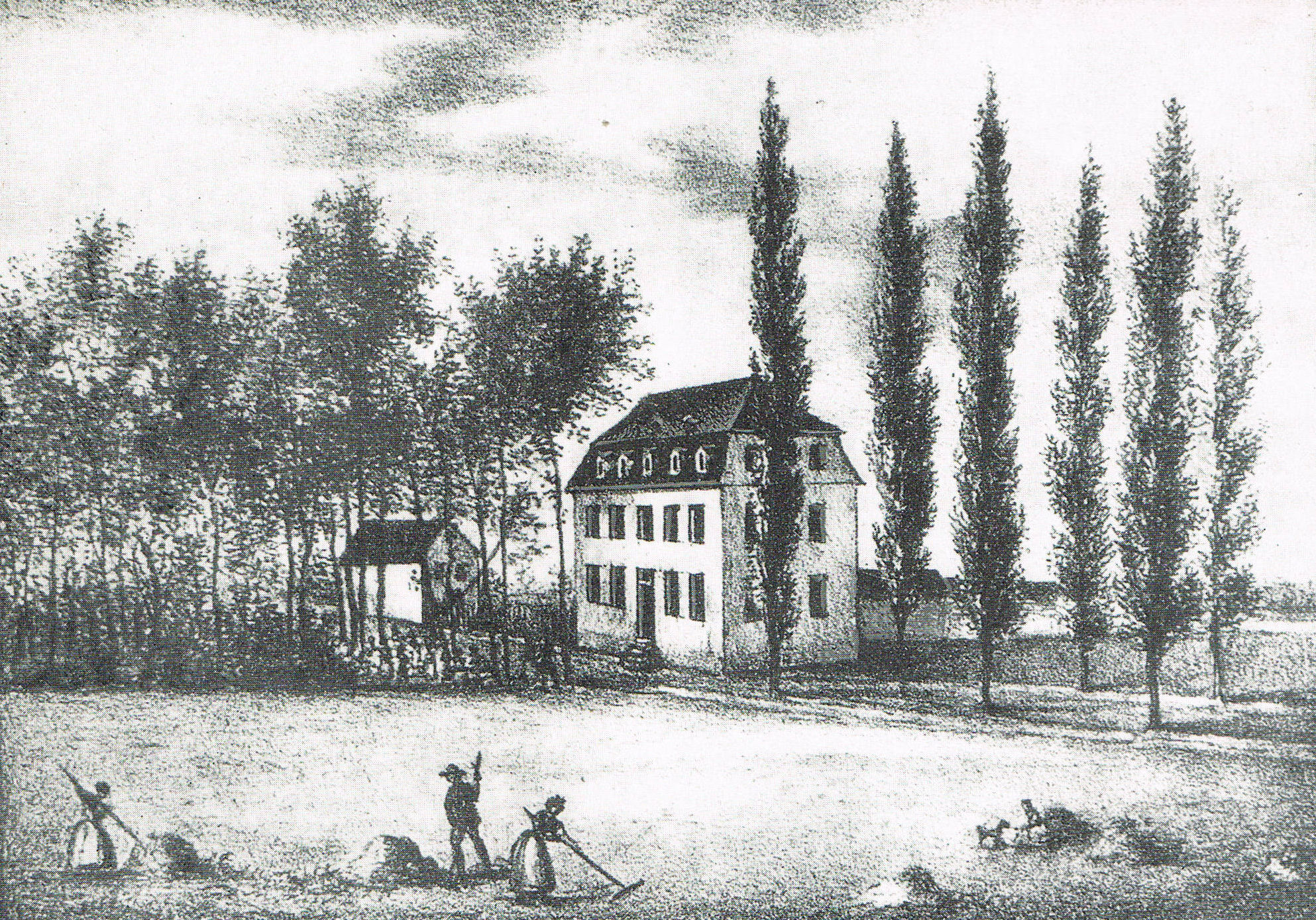 Historische Ansicht der "Goldenen Egge" auf den Pulverweiden (Lithographie), Halle (Saale)